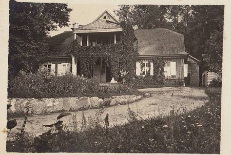 Сядзібна-паркавы ансамбль Скіндэраў у Міхайлоўшчыне